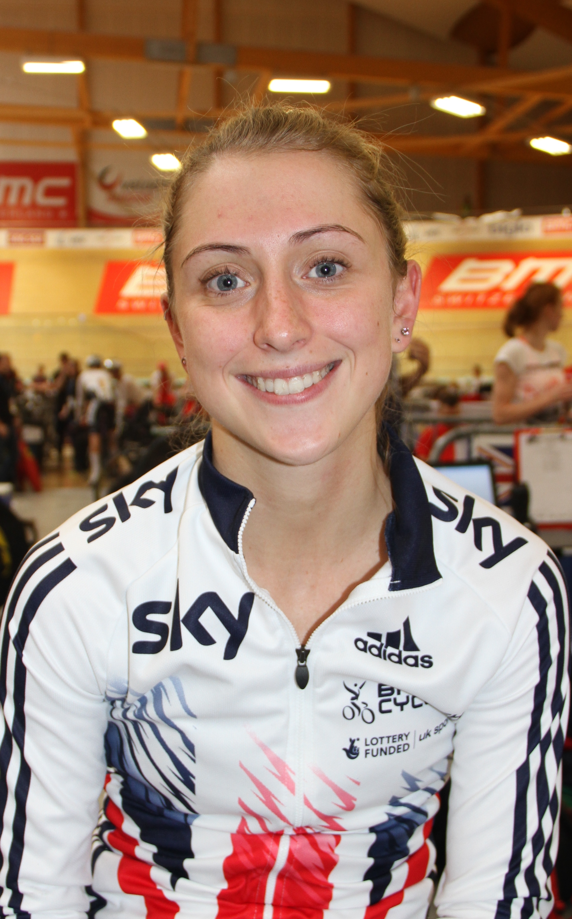 Laura Trott, britische Radsportlerin The making of this document was supported by the Community-Budget of Wikimedia Germany.